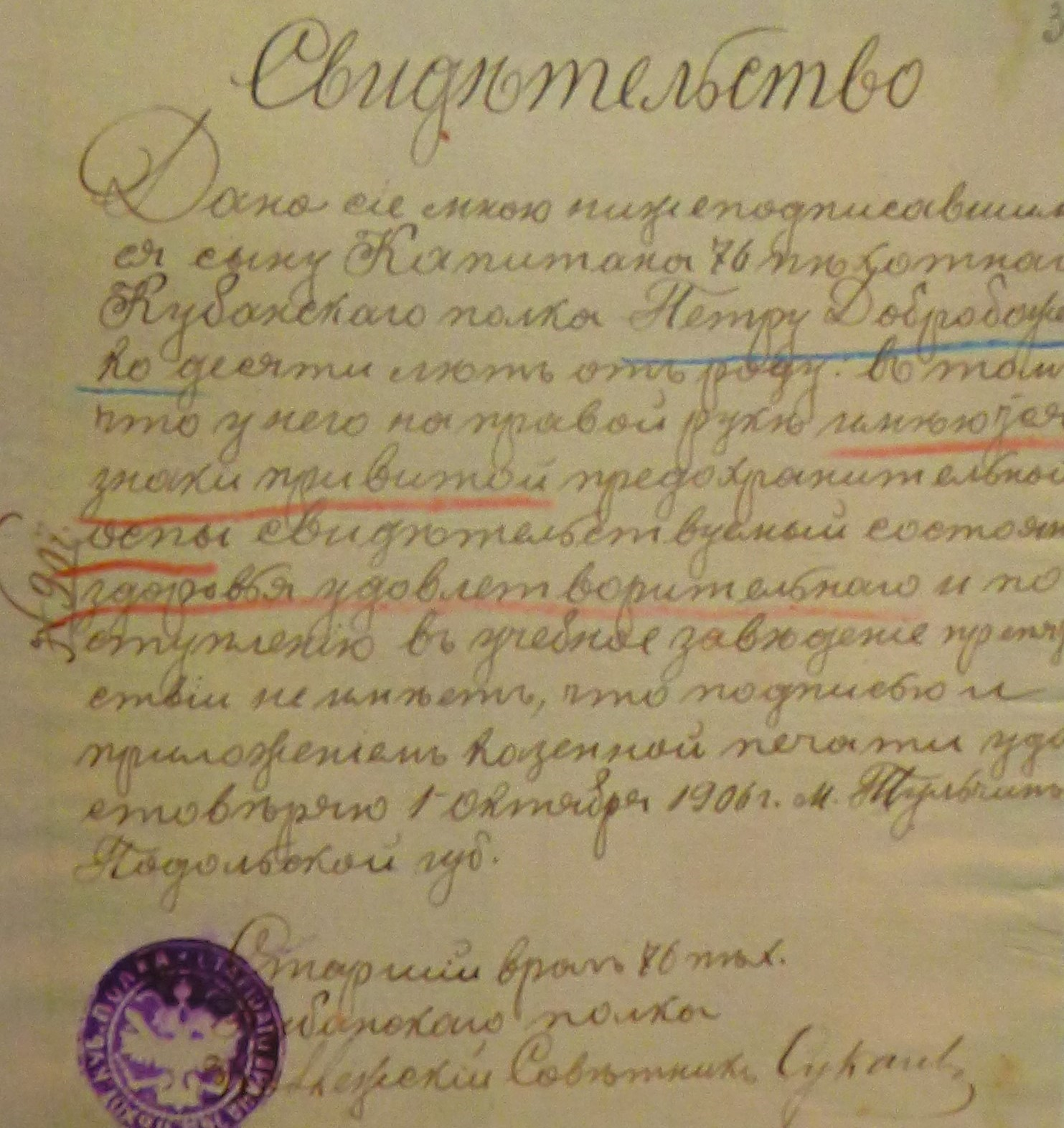 Свидетельство о прохождении прививки от оспы 10-ти летним мальчиком для поступления на учебу. Выдано старшим врачом пехотного полка. 1 октября 1906 года